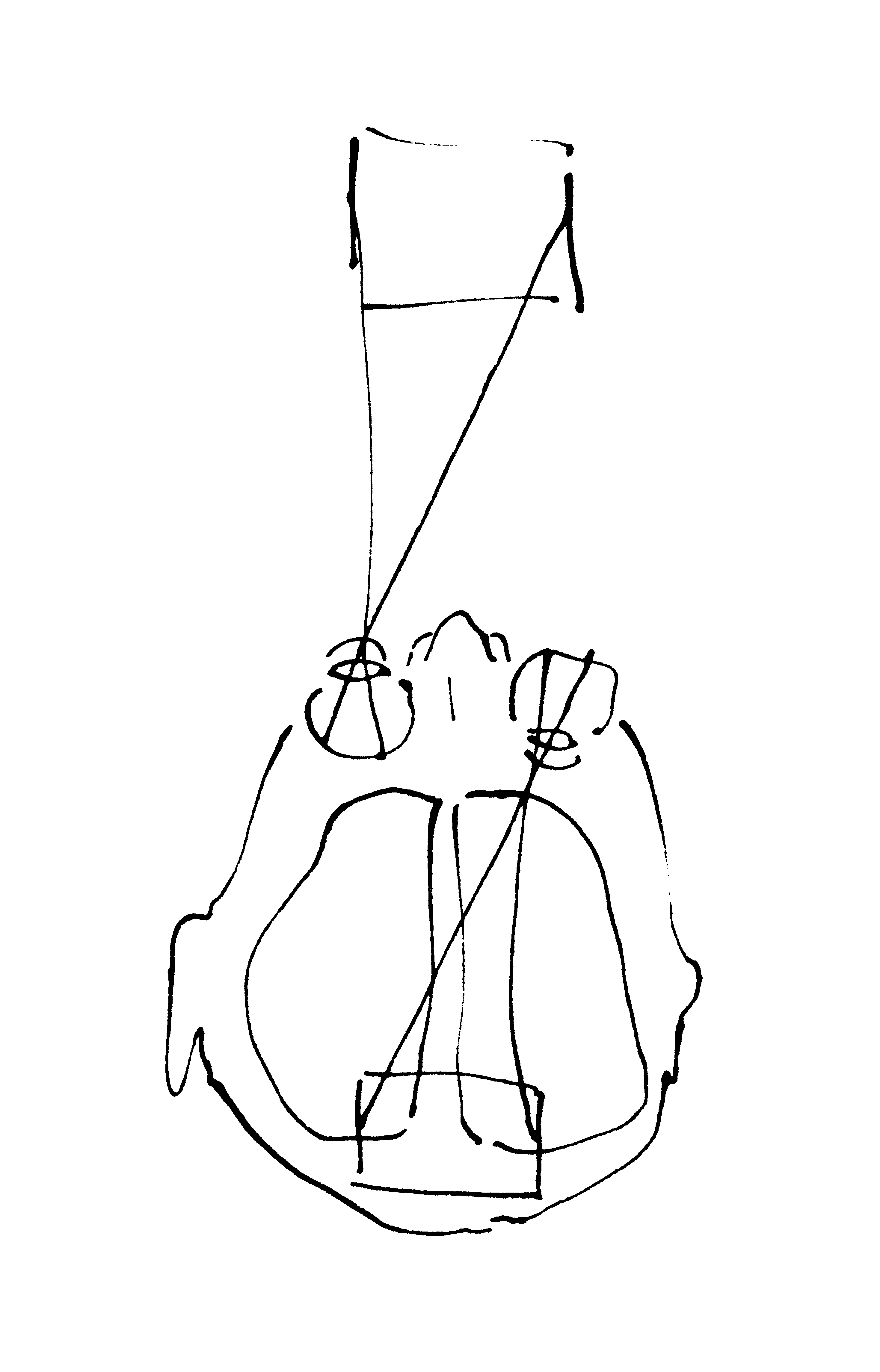 Emmanuel Fournier, "Se regarder regarder", 1990, paru dans "Creuser la cervelle", éditions PUF, 2012